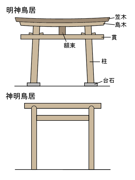 一般的な鳥居の形状 投稿者が作成 画像:ToriiJapaneseGate.png